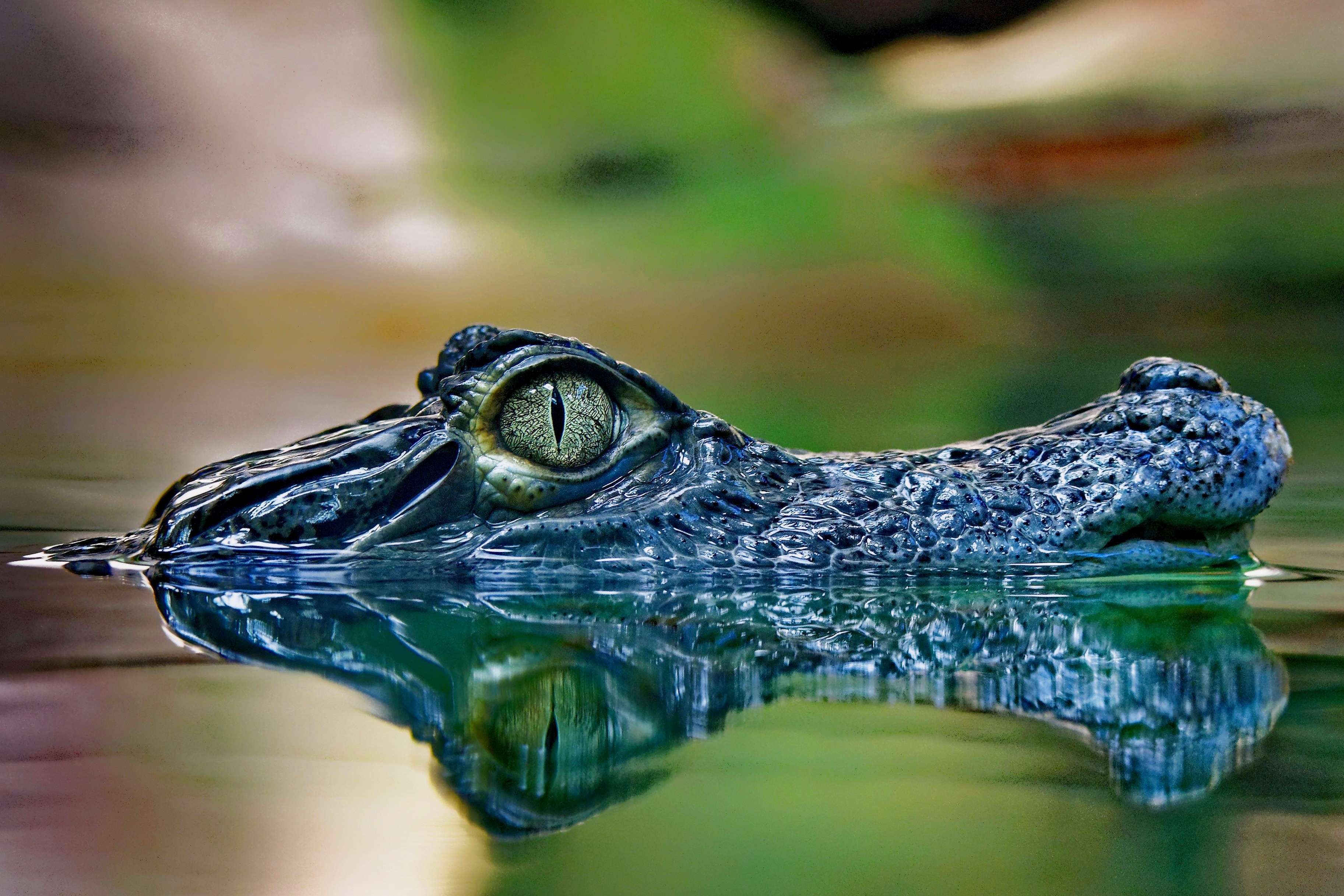 Caïman à lunettes (Caiman crocodilus)